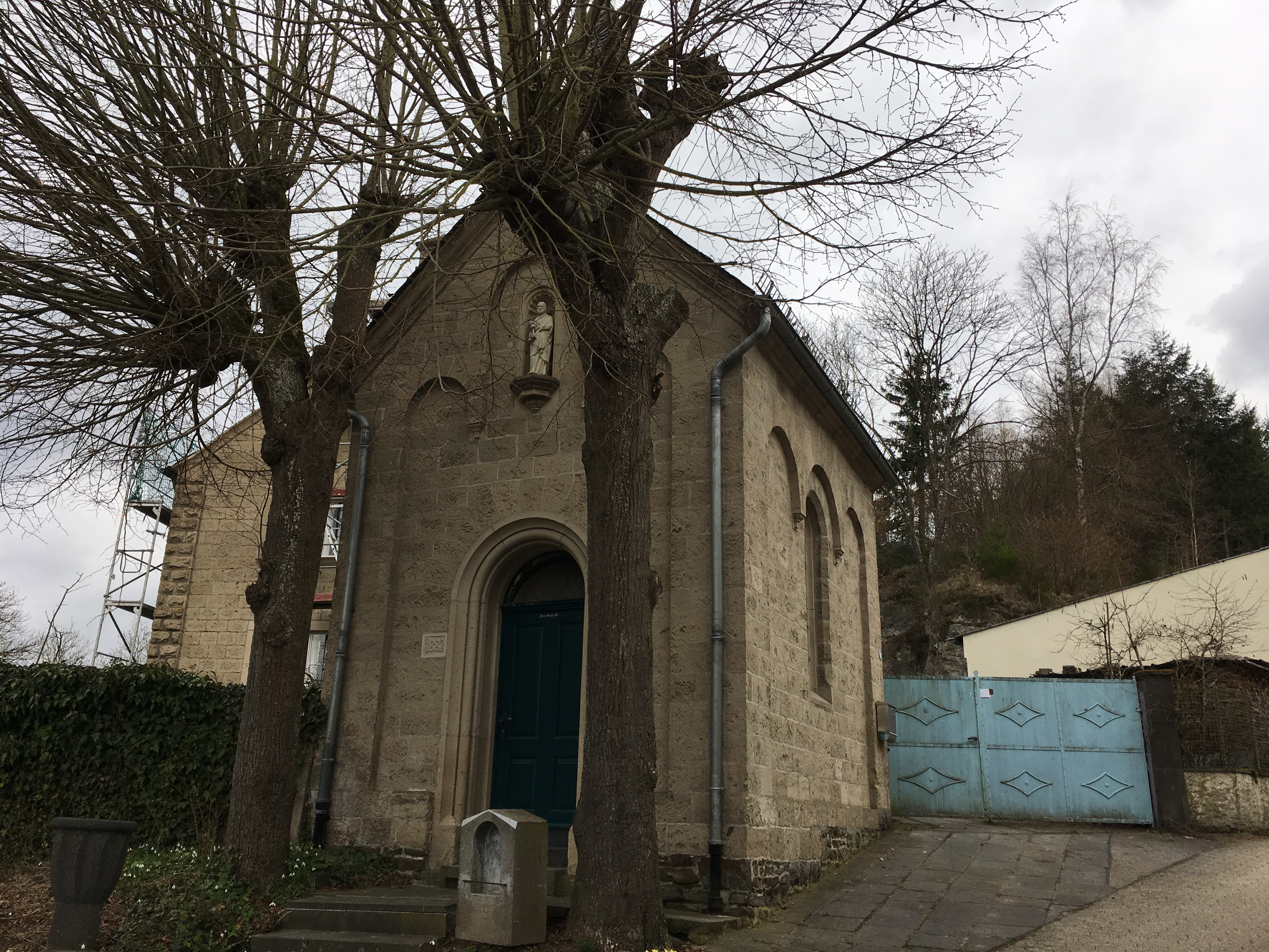 Die Marienkapelle in Rieden im Landkreis Mayen-Koblenz in Rheinland-Pfalz entstand im Jahr 1882 im Stil der Neuromanik. Im Innern des nicht geosteten Bauwerks steht ein Blockaltar, der mit einem Vierpass und einem Griechischen Kreuz verziert ist.